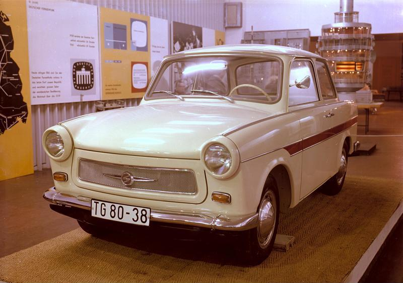 Zentralbild/Weiß, 3.5.1963 Der „Sachsenring Trabant 601“ … … den unser Foto in der Ausstellung „Seht welche Kraft“ in unserem Zentralen Klub der Jugend und Sportler in der Karl-Marx-Allee, Berlin zeigt, wurde zu Ehren des VI. Parteitages der SED entwickelt. Die Serienfertigung diese Autotyps wird Ende 1964 vom VEB Automobilwerk Sachsenring Zwickau aufgenommen.